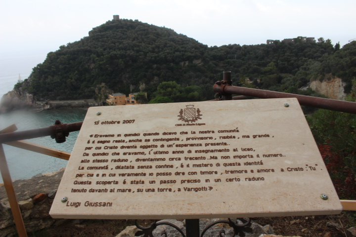 Chiesa medievale di San Lorenzo. Ricordo Don Giussani. This is a photo of a monument which is part of cultural heritage of Italy.